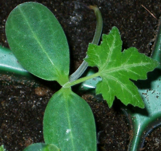 Cassabanana (Sicana odorifera), Keimling